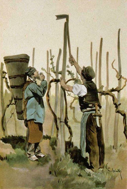 Vignerons (environs_d'Obernai). Bibliothèque nationale et universitaire de Strasbourg